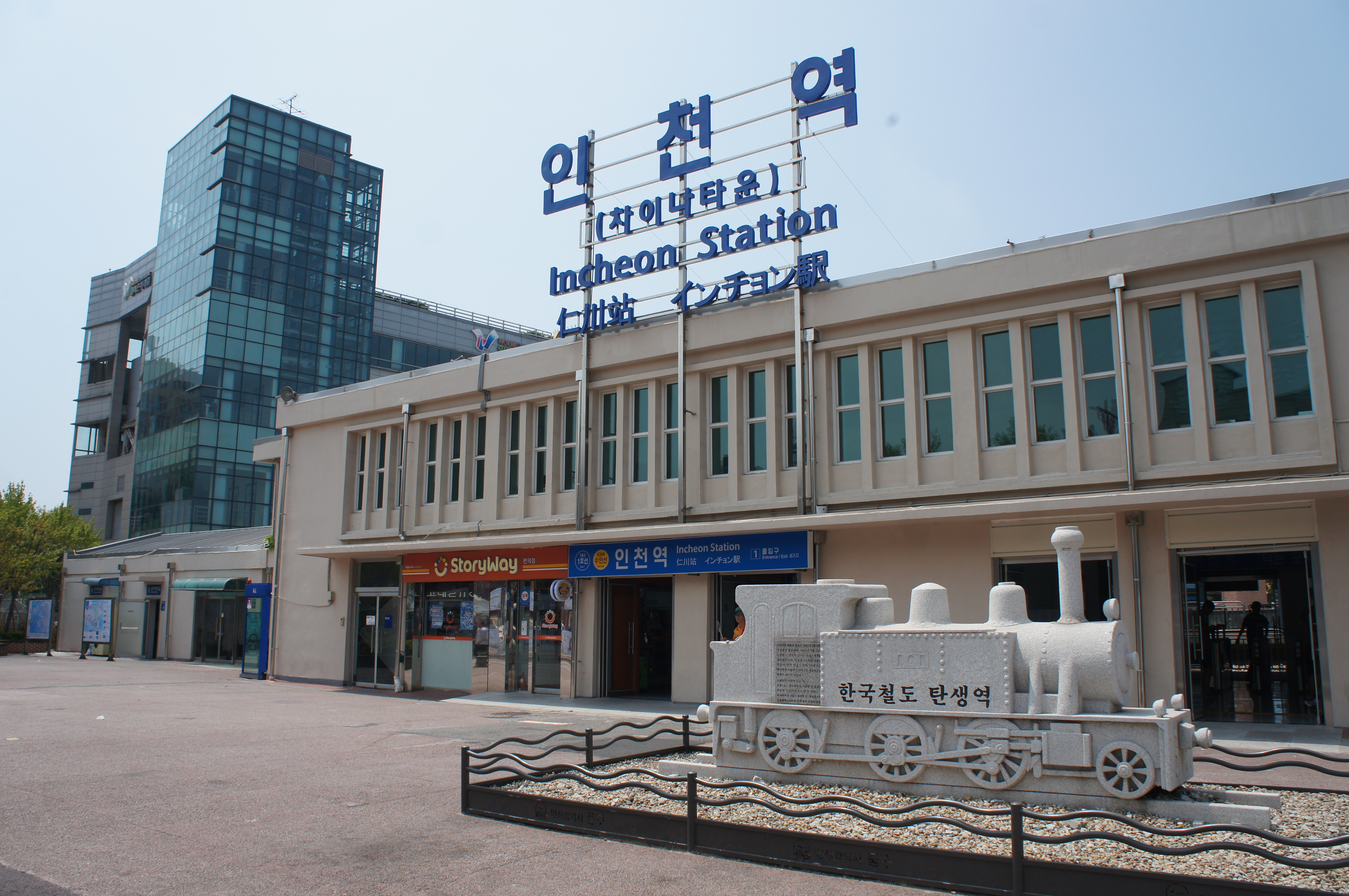 인천역 역사